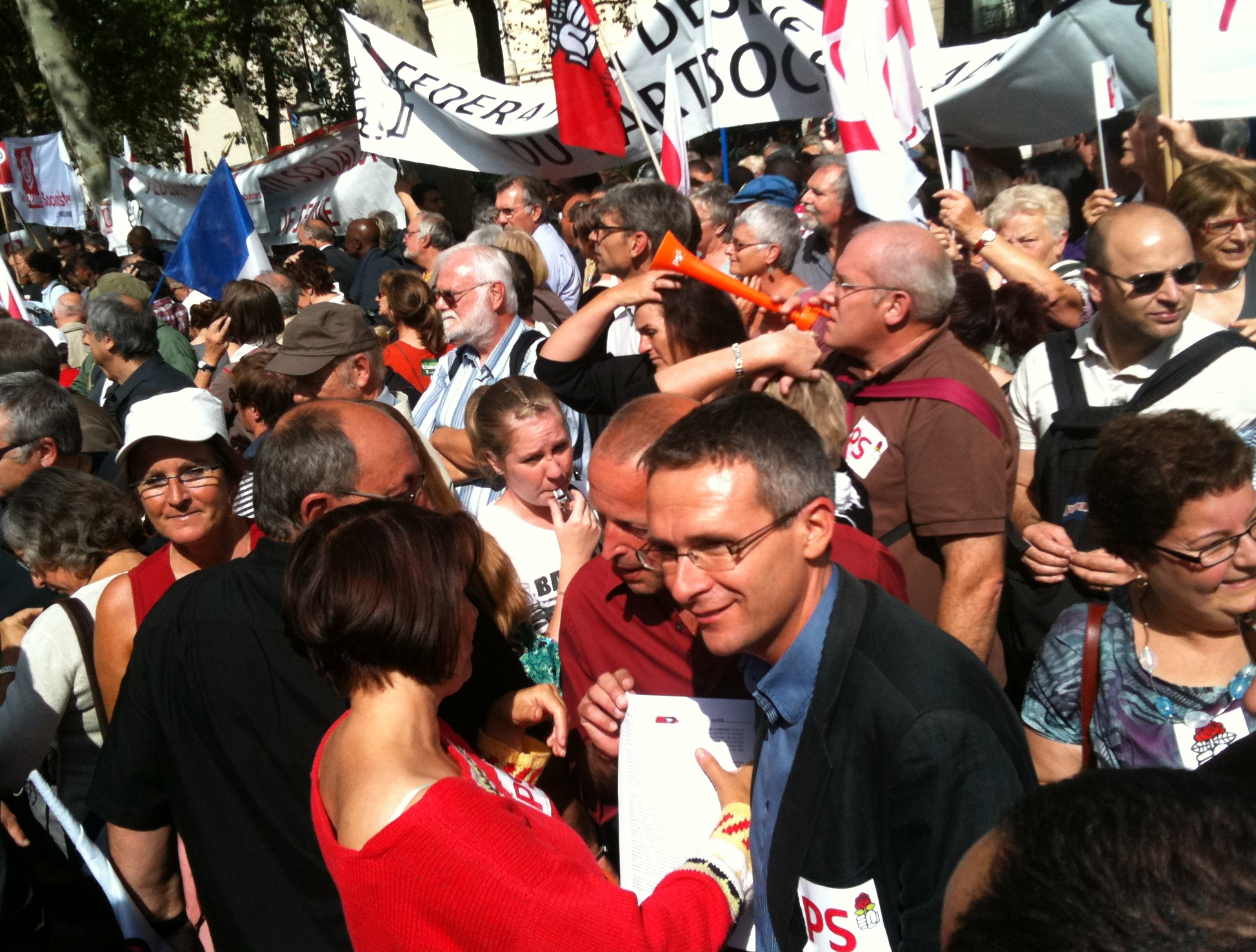 Les Socialistes au métro Filles du Calvaire lors de la manifestation parisienne contre la réforme Woerth des retraites.